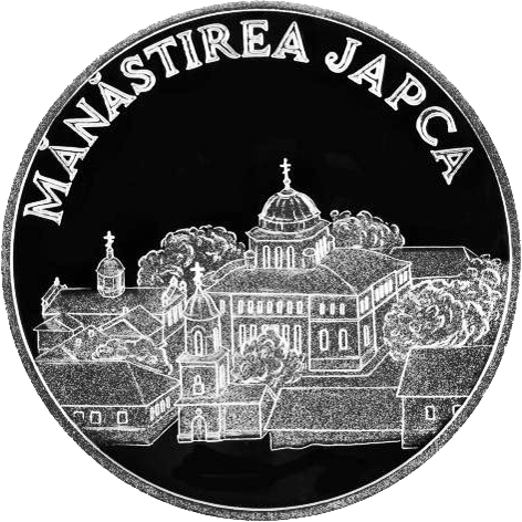 Реверс памятной монеты "Жапский монастырь"